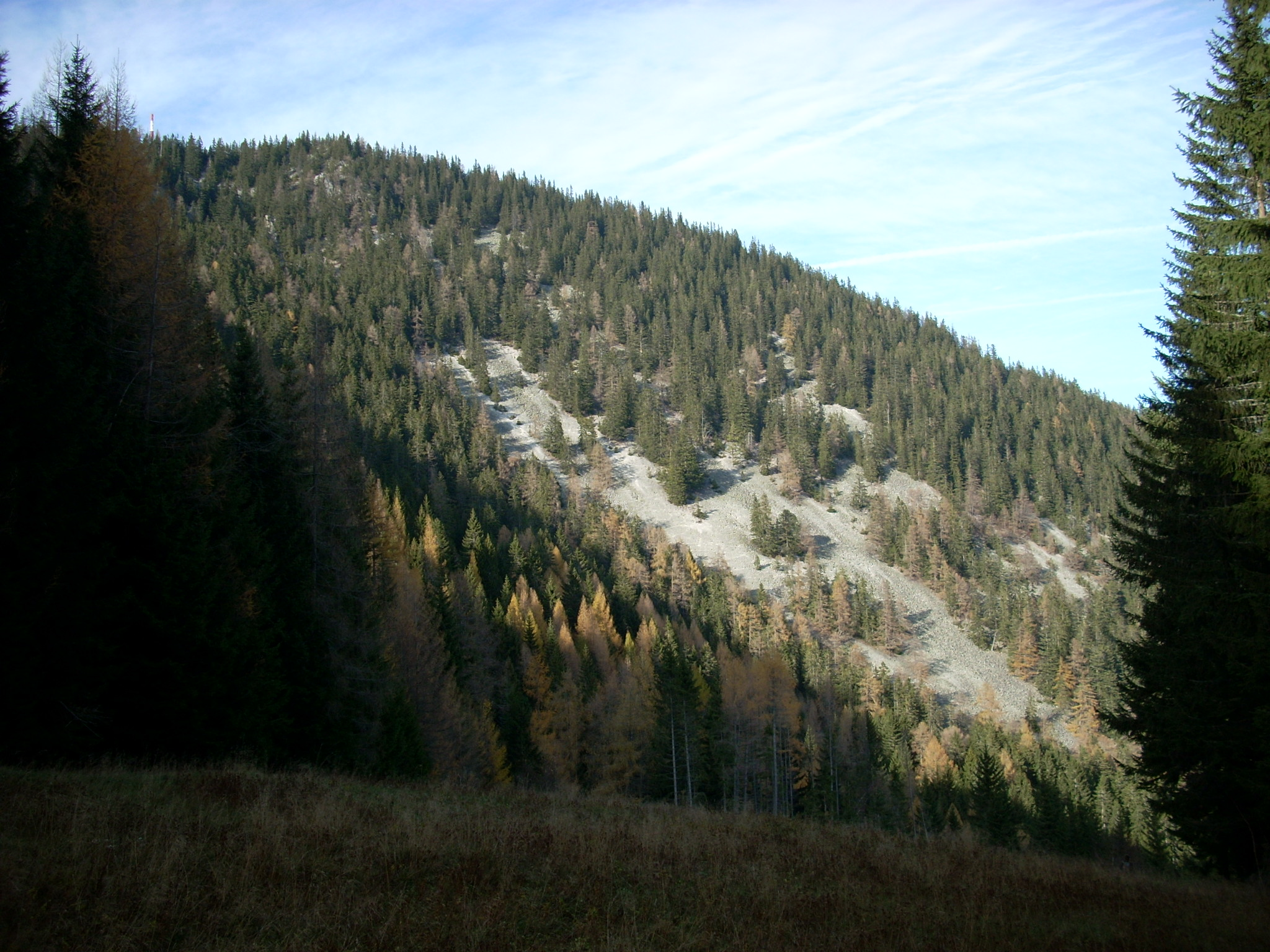 große Blockhalde am Südhang des Sonnwendsteins (1523m)